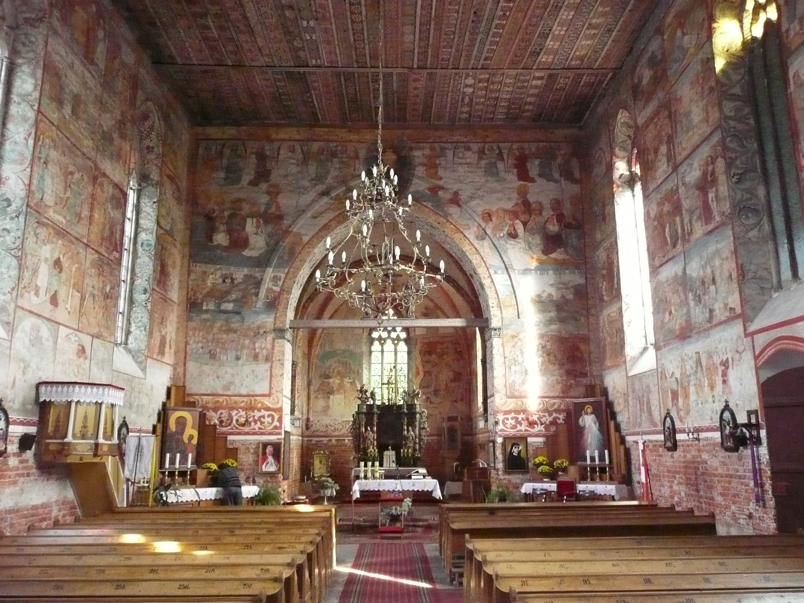 Blick in das Innere der Kirche von Mollwitz (Małujowice)